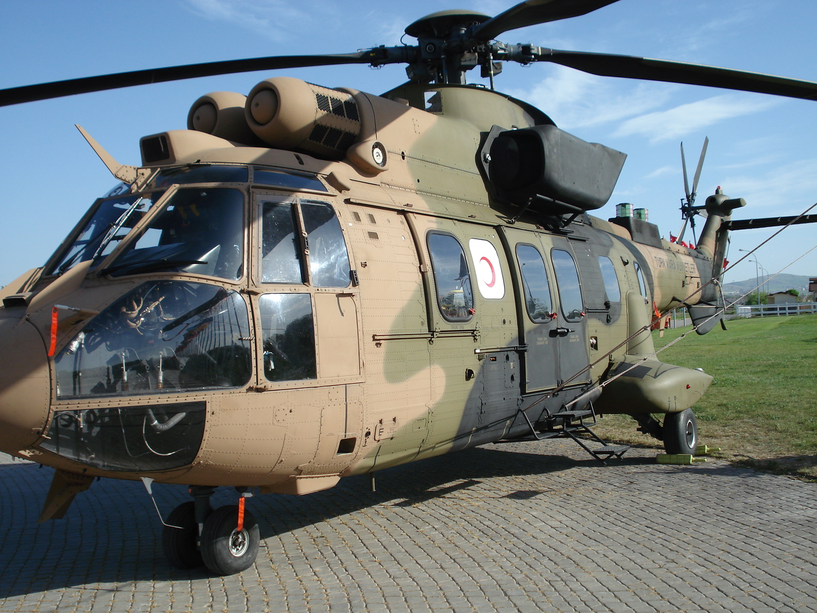 IDEF '07 Savunma Fuarı'nda çekildi.AS-532 Cougar.23 Mayıs 2007